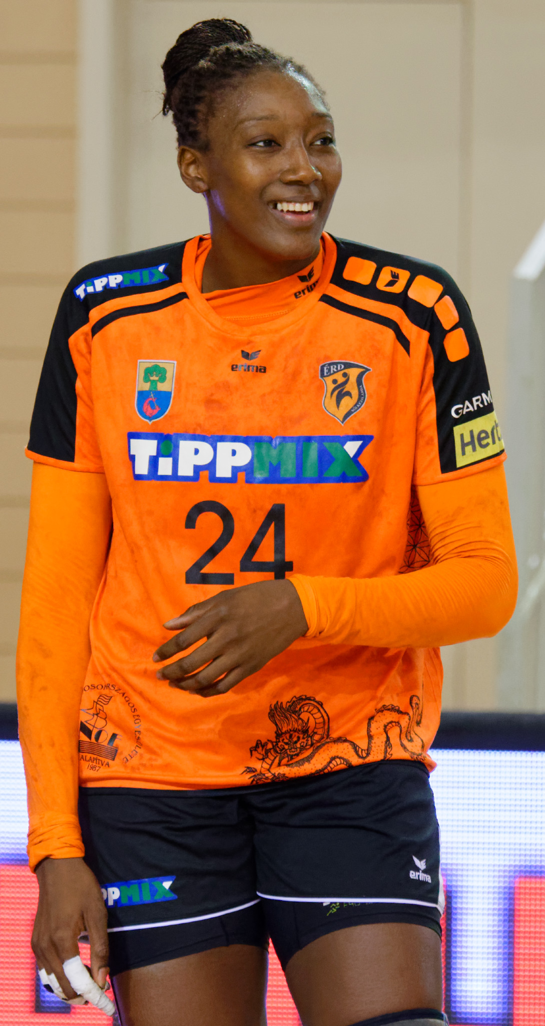 Rencontre retour du 3e tour de la coupe EHF, Issy Paris Hand / Erd. A Issy Les Moulineaux, le 18 novembre 2017.